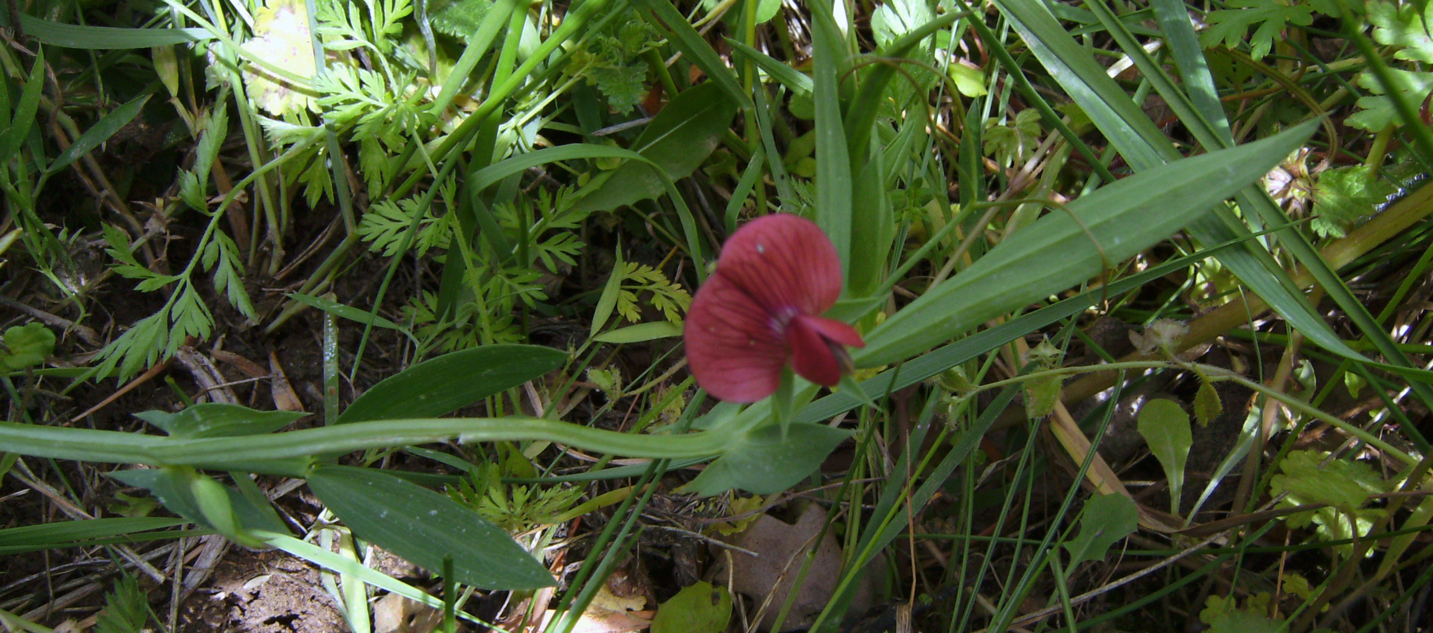 Lathyrus cicera, Castelltallat, Catalonia